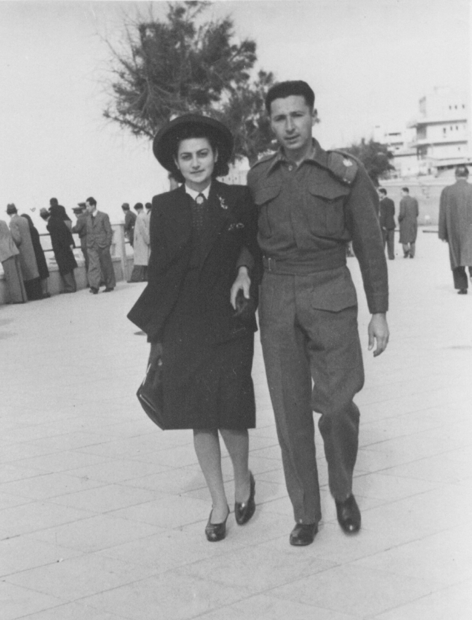 שושנה-שרירא-ואריאל-כהן---מתוך-יומן-המכתבים-1